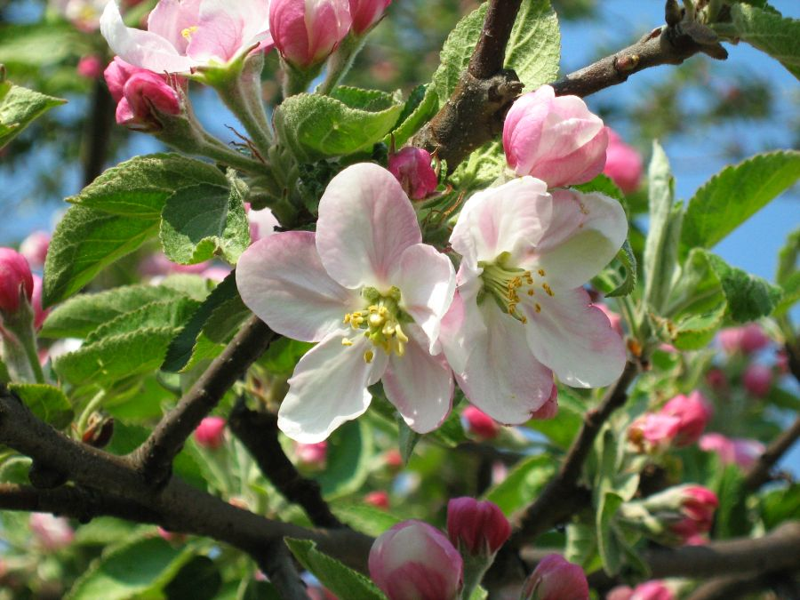 Jabłoń Sieversa (Malus sieversii (Ledeb.) Roem.) z mojego ogrodu